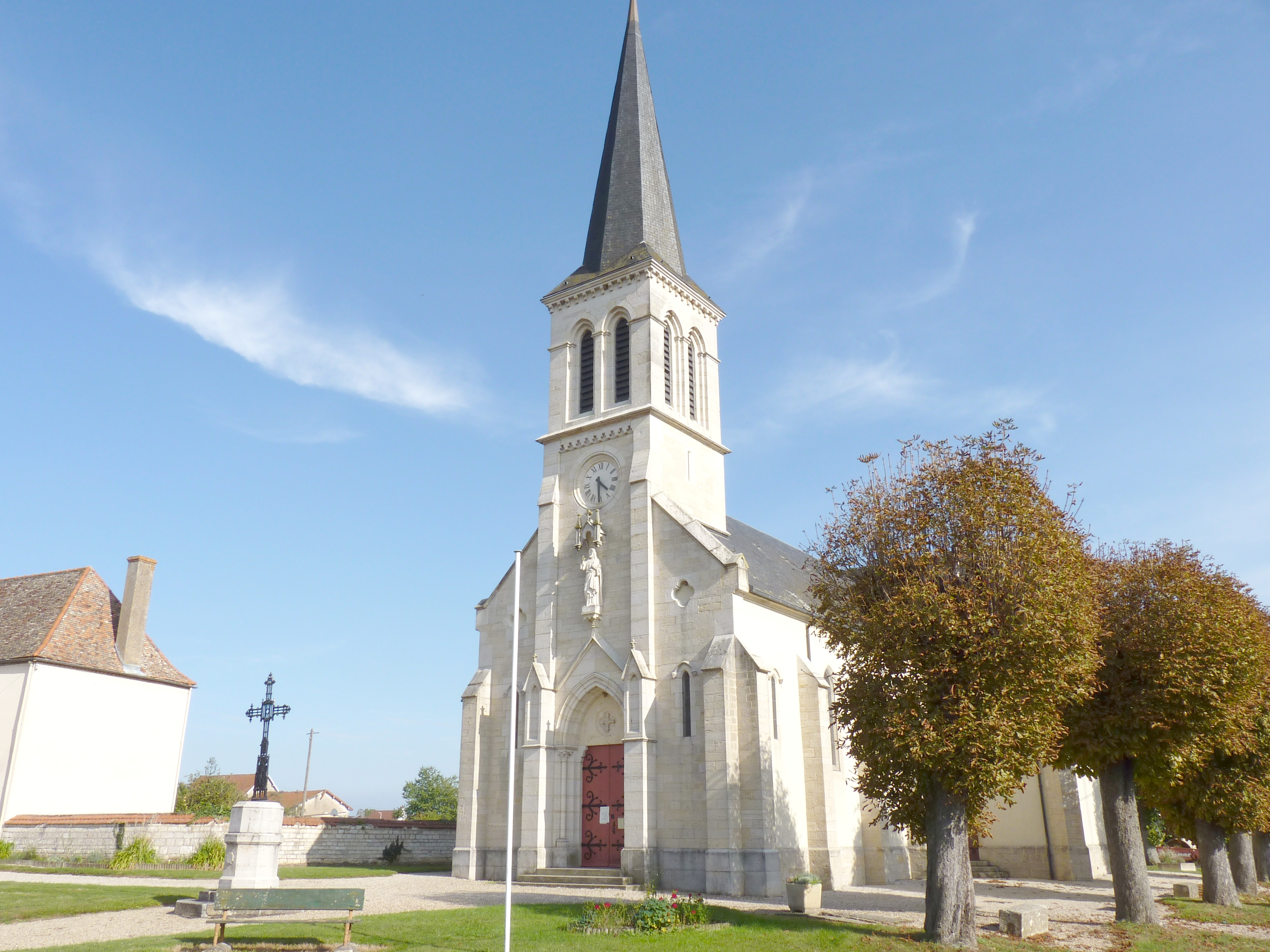 Église paroissiale Saint-Antoine de Pagny-le-Château, entrée et clocher (Côte d'Or, Bourgogne, France)